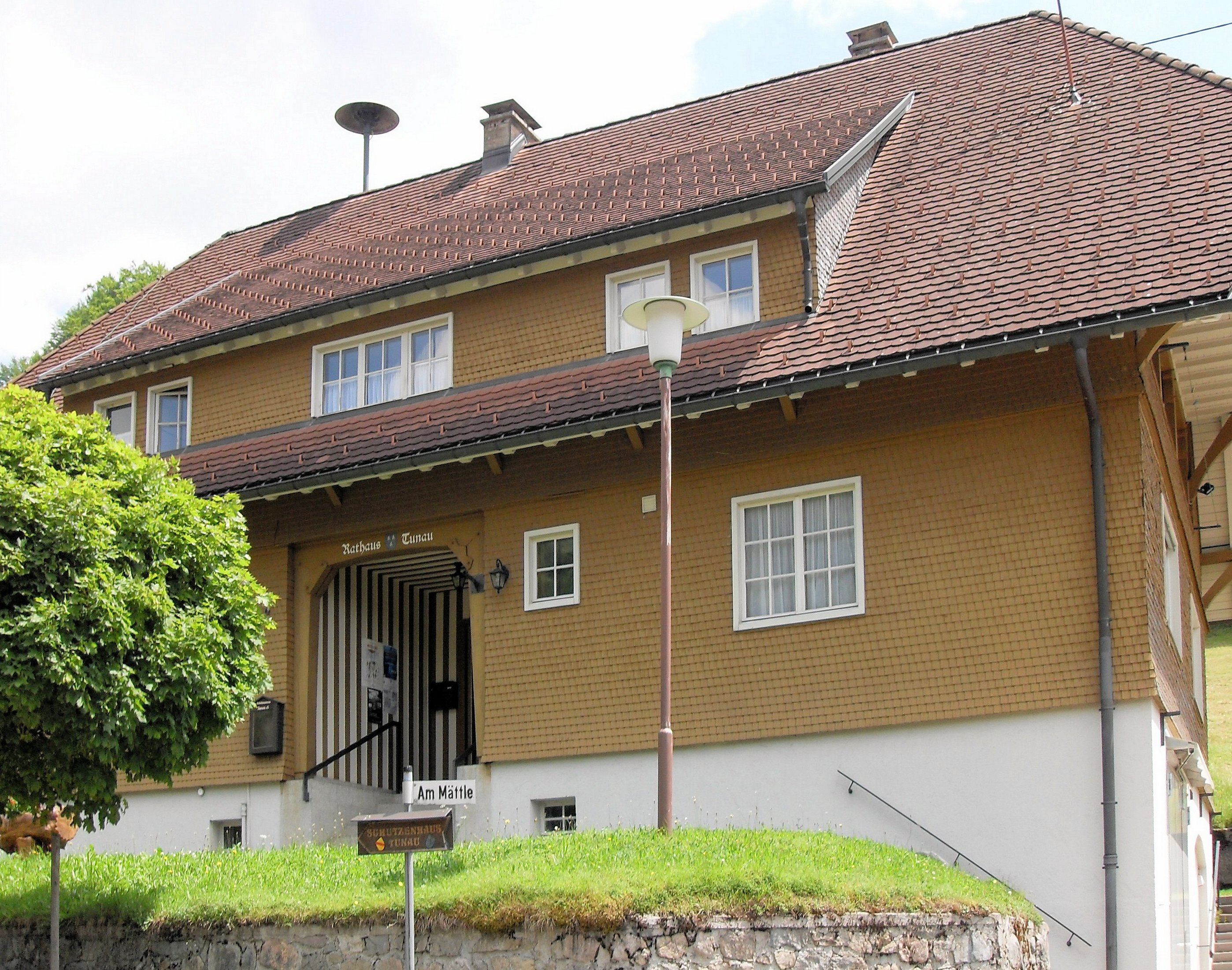 Rathaus in Tunau, Schwarzwald, Deutschland